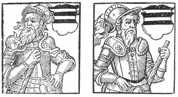 Dvojportrét Viktorína a Hynka z Poděbrad